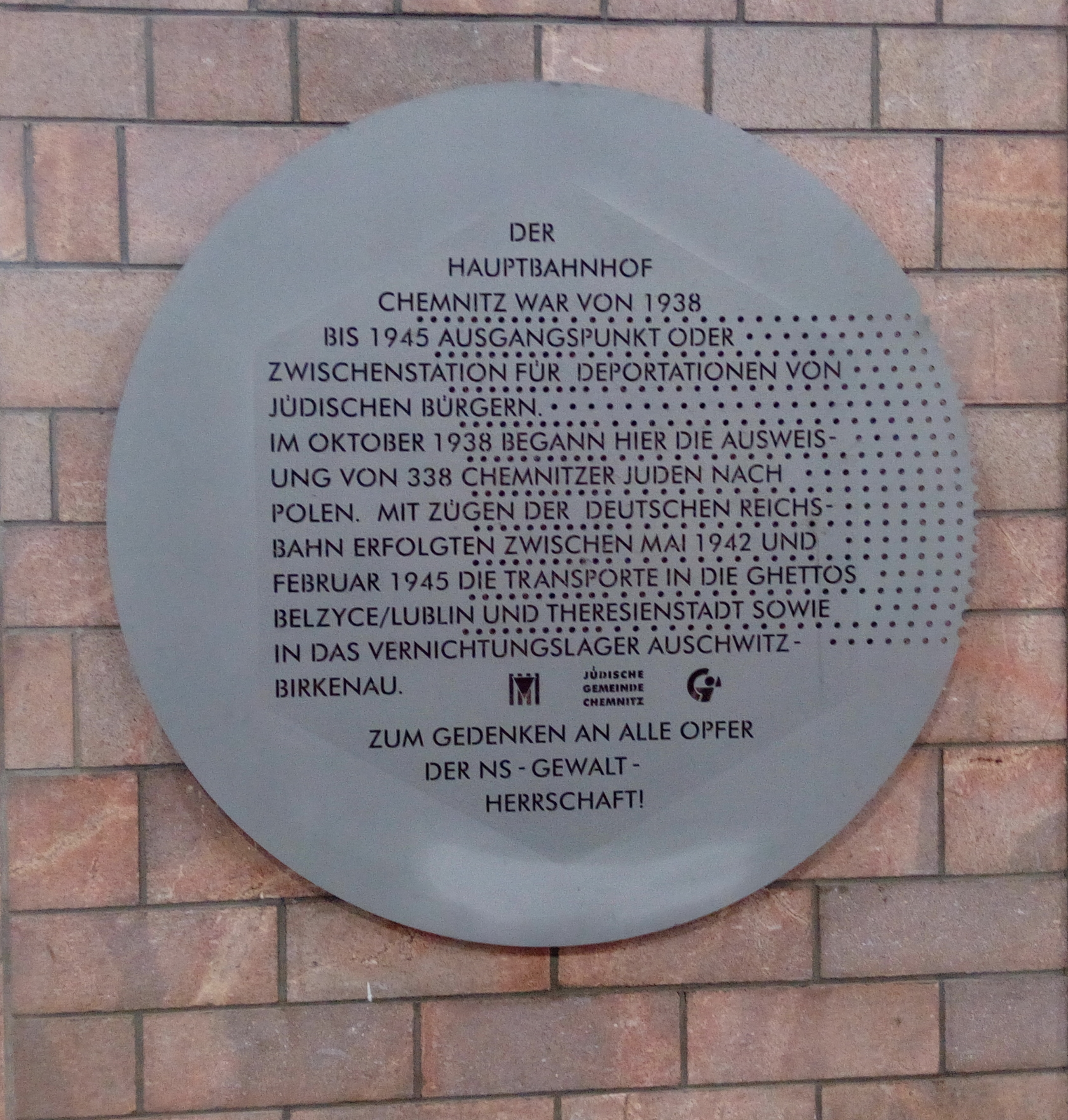 Denktafel der jüdischen Gemeinde Chemnitz an die Deportation von jüdischen Bürgern